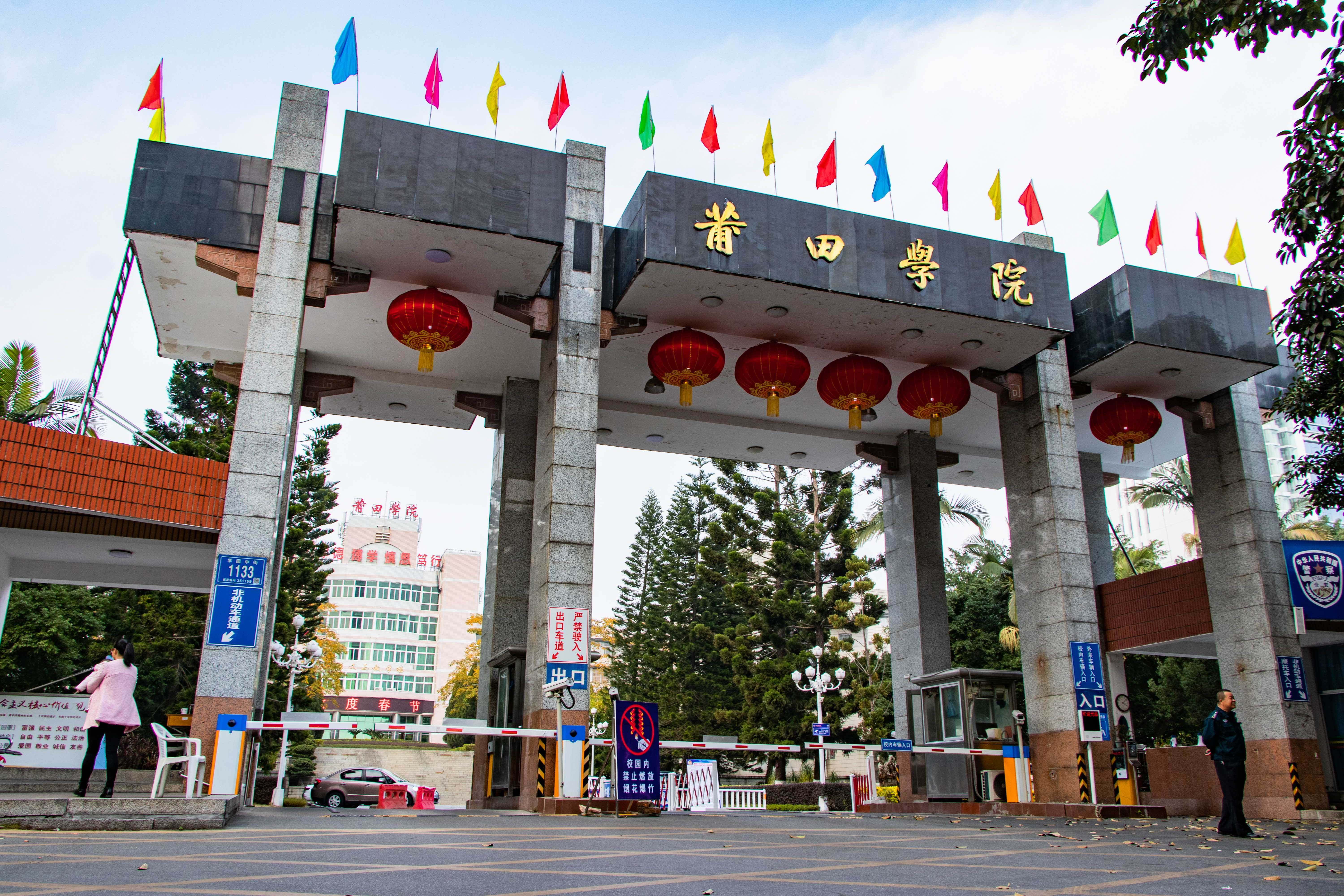 中文（中国大陆）: 莆田学院大门